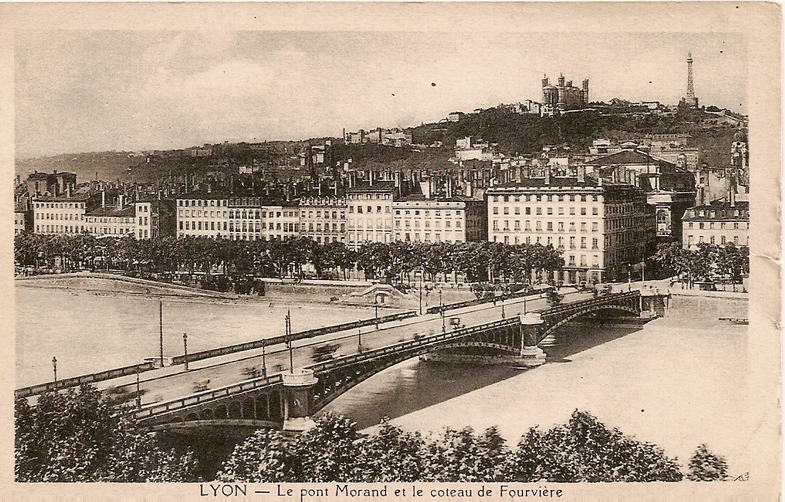 Pont Morand à Lyon vers 1900. Vue vers l'aval et l'ouest sur le quai Jean Moulin, avec la colline de Fourvière en arrière-plan. On voit aussi la fin du quai André Lassagne, qui se termine côté amont du pont.